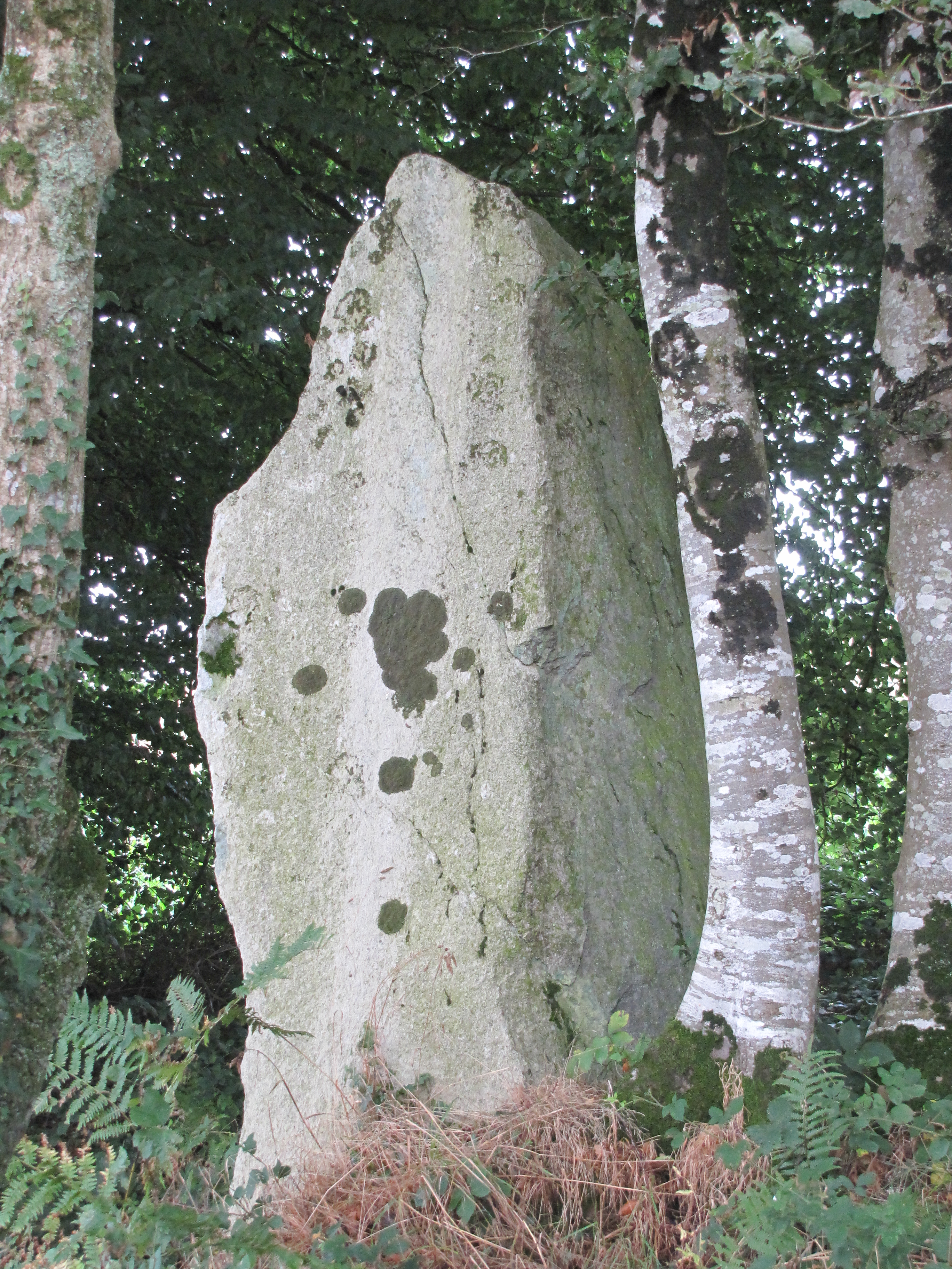 Ce menhir fait à l'origine partie d'un alignement de 3 rochers détruit en 1967. Aujourd'hui 2 rochers sont au sol, dont un avec des inscriptions. .